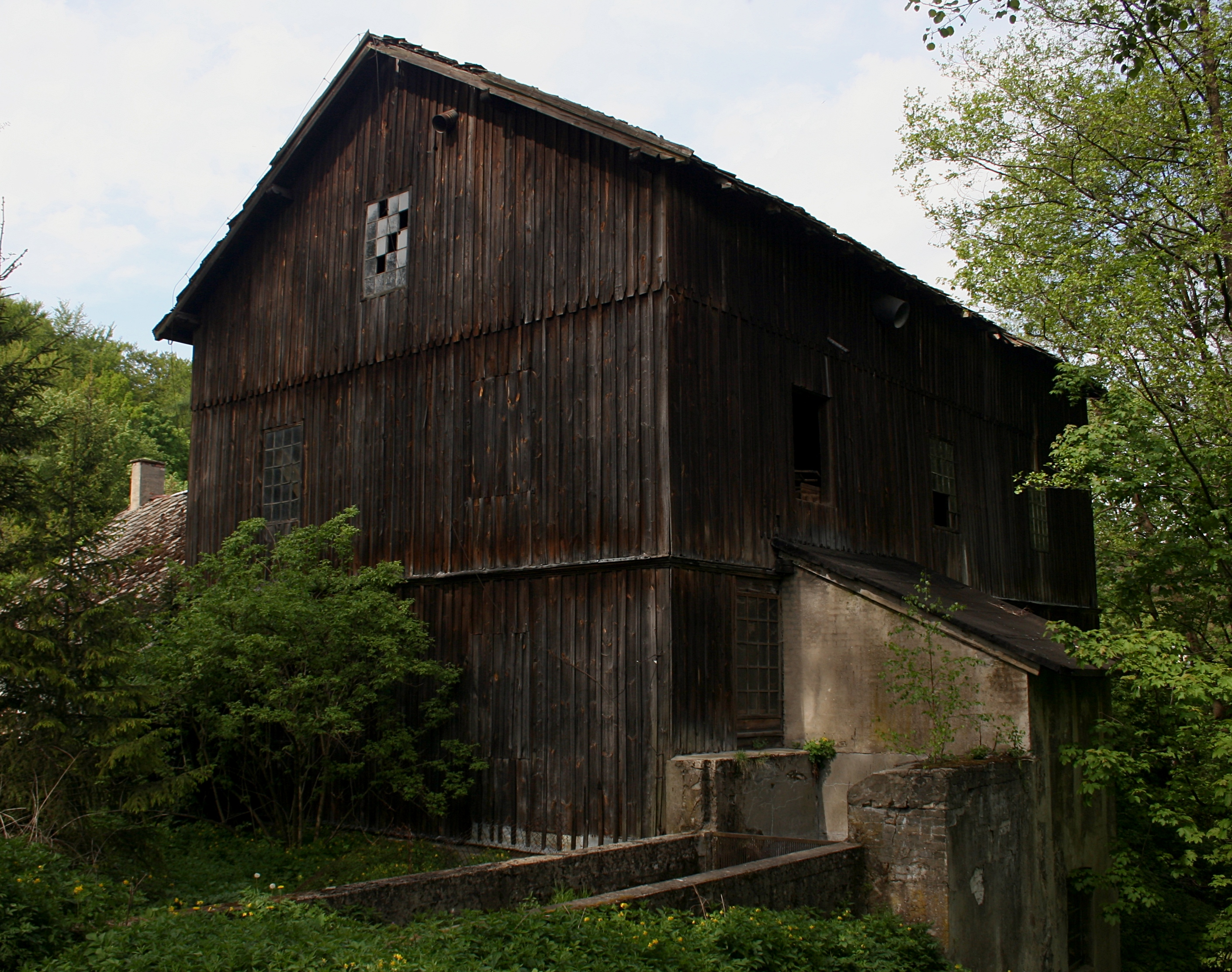 Młyn wodny Kołaczew na terenie rezerwatu przyrody Parkowe. Obiekt położony jest na szlaku architektury drewnianej